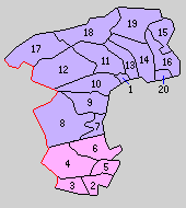 石川県珠洲郡の町村制施行時の町村。